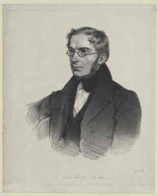 Scheiger Josef von, Kulturhistoriker und Postbeamter. * Wien, 2. 2. 1801; † Graz, 6. 5. 1886. Sohn eines Juweliers, ab 1861 2. Gatte der Fachschriftstellerin Katharina Pratobevera; stud. an der Univ. Wien Jus (bis 1823), war 1820 wegen burschenschaftlicher Betätigung in Untersuchungshaft. 1824–27 bei der Stiftsherrschaft Schotten in Wien tätig, zuletzt als Stiftsrichter, trat dann als Konzeptspraktikant in die Fahrpostdion. in Wien ein; 1835–39 Oberpostverwalter in Zara (Zadar), 1839–45 Adjunkt der Postdion. in Venedig, 1845–50 Oberpostverwalter, 1850 Postdir. von Graz. 1867 i. R. Erste literar. Versuche (1819) brachten S. in Verbindung u. a. zu Hormayr (s. d.), in dessen „Archiv . . . “ er eine Reihe von kulturhist. Arbeiten veröffentliche. Früh wandte er sich der archäolog. Topographie, insbes. der Burgenarchäologie zu, als deren Begründer in Österreich er anzusehen ist. Auf zahlreichen Fußreisen, bes. in NÖ, schuf er sich eine umfangreiche Sammlung topographisch getreuer Aufnahmen von Wehrbauten, auf deren Grundlage er eine Reihe von Arbeiten verfaßte.